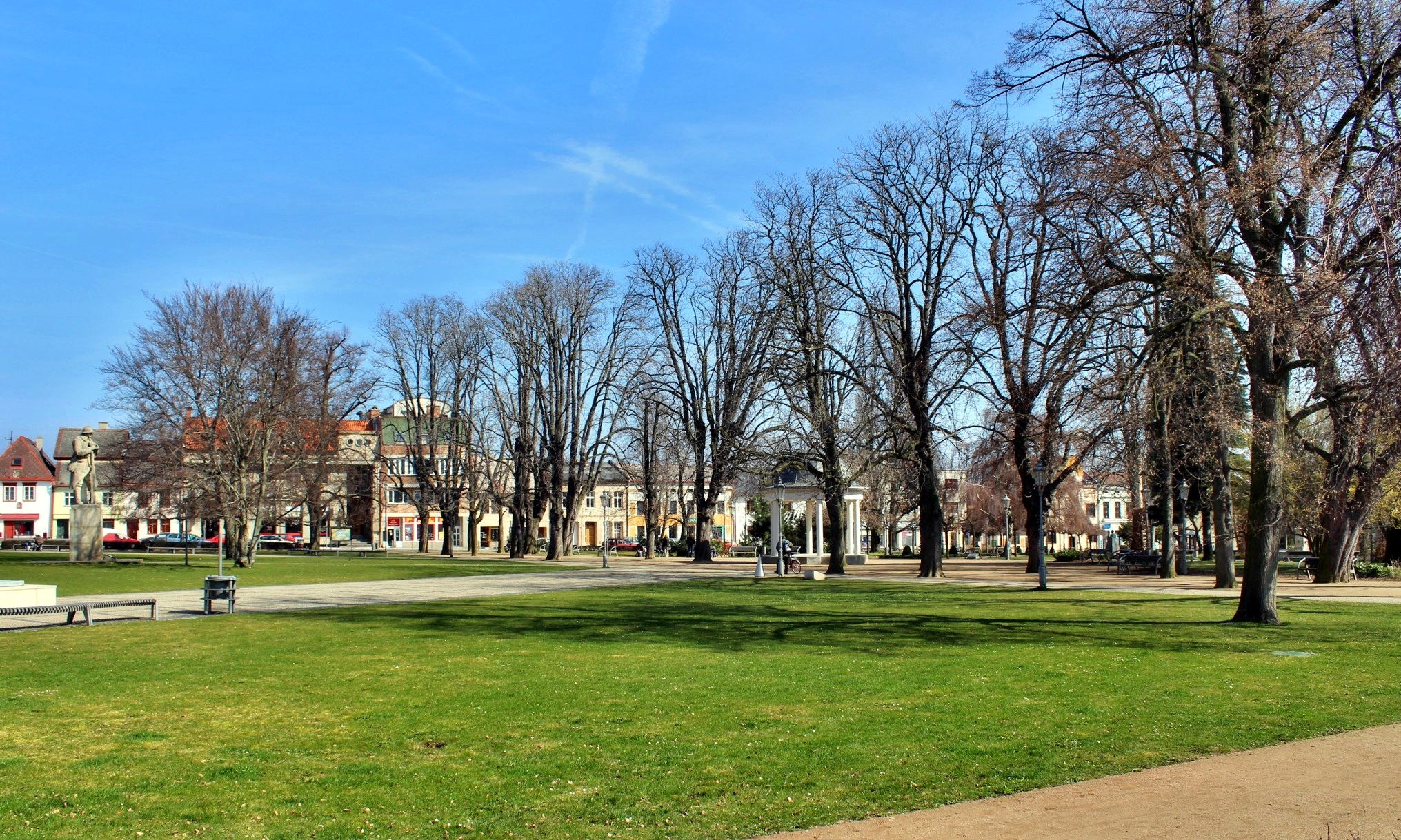 Masarykovo náměstí (Bělá pod Bezdězem)